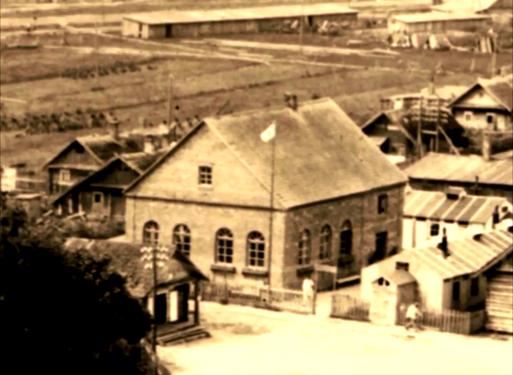 Беларуская (тарашкевіца): Лынтупы (Łyntupy). Сынагога